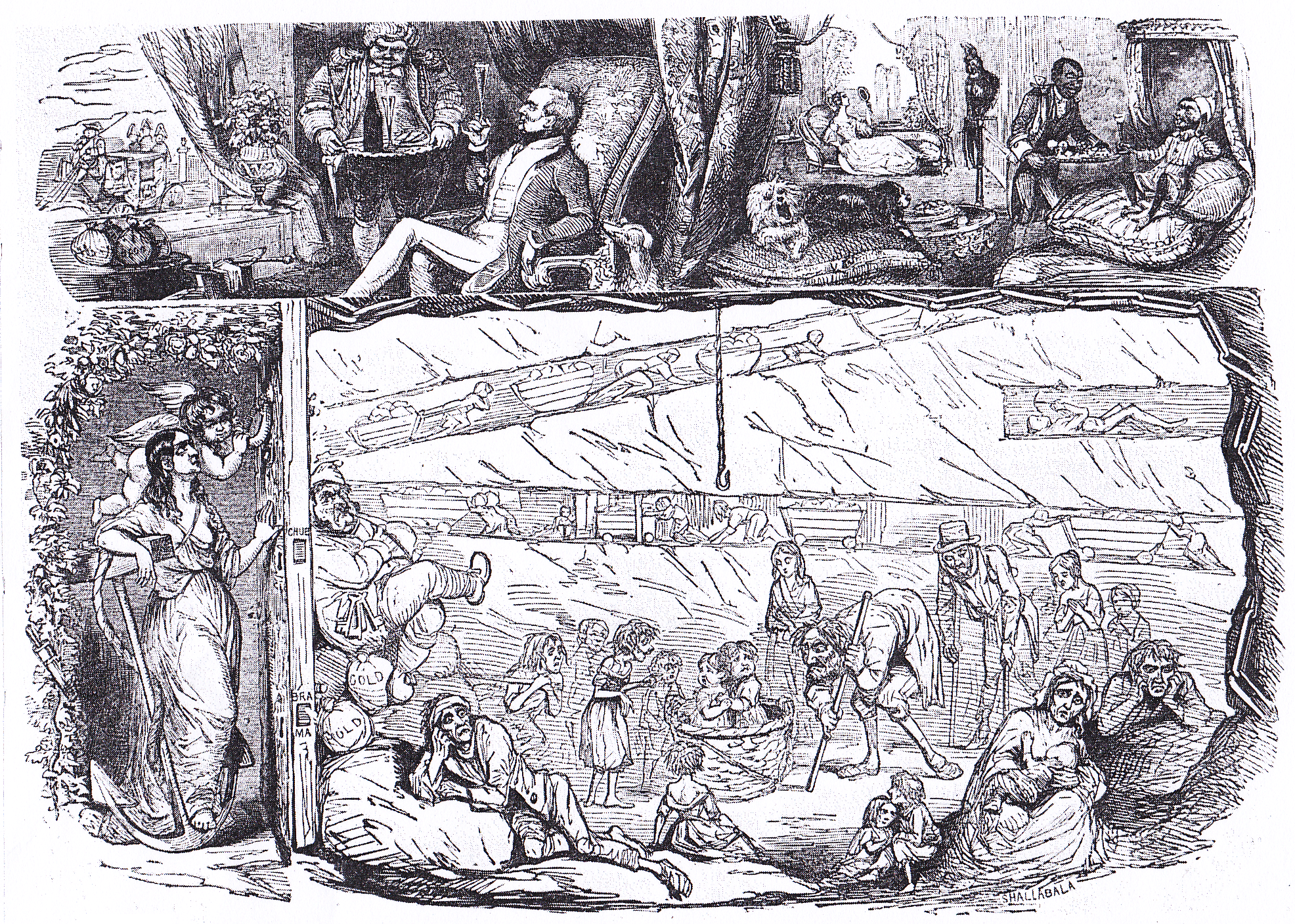 Bildunterschrift im Original: „CAPITAL AND LABOUR“. Karikatur aus der englischen Zeitschrift „Punch“ (Ausgabe: July-Dec 1843, S. 49.) aus dem Jahr 1843. Wieder abgedruckt in P. Lane: British Social and Economic History from 1760 to the present day. Oxford: Oxford University Press 1979, S. 44.